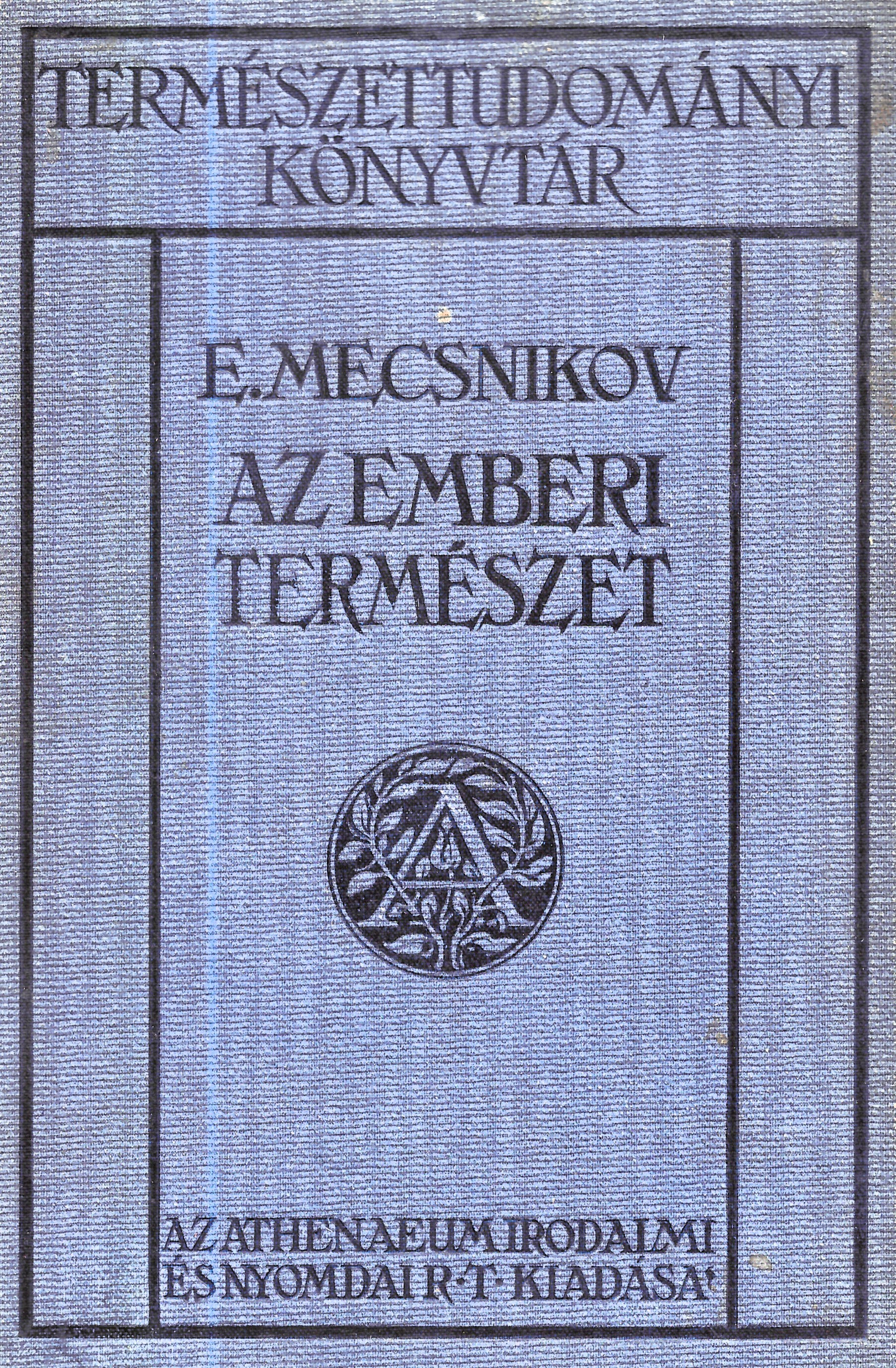 Ilja Iljics Mecsnyikov: Az emberi természet (1910-es évek, a borító készítője nem ismert)